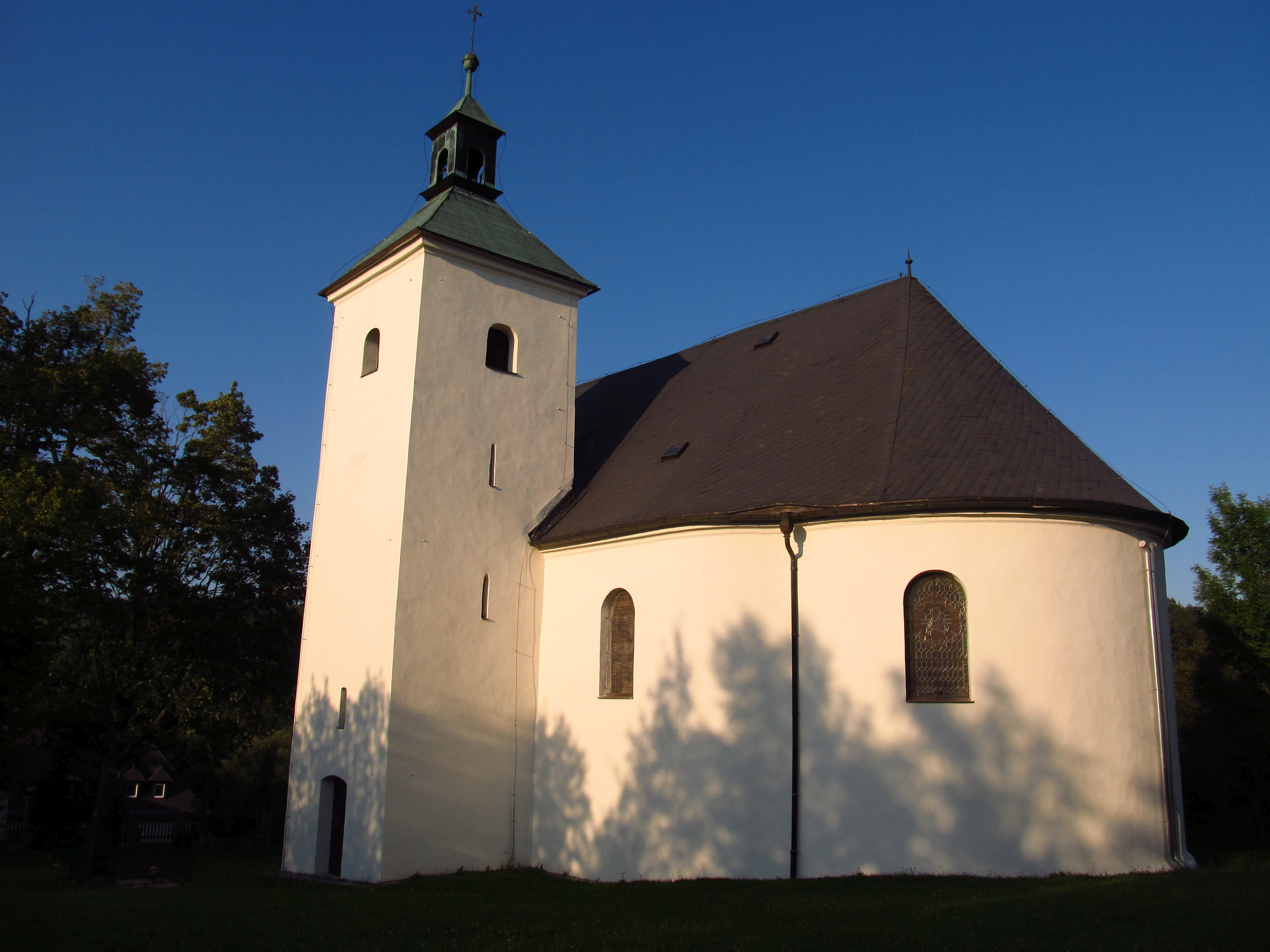 Kostel svatého Jakuba Staršího, Dolní Moravice.